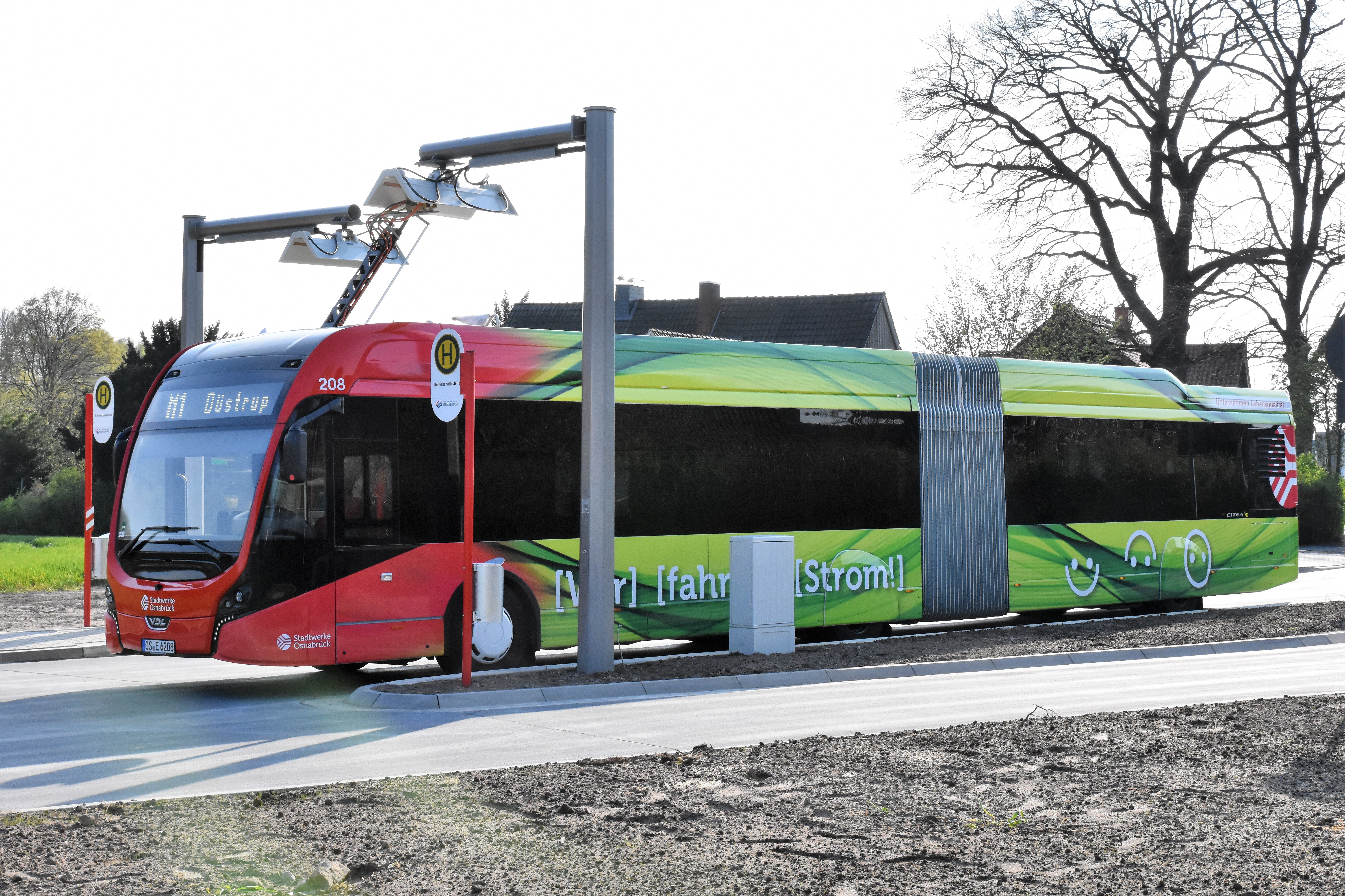 Am Endpunkt der Metrobuslinie 1 in Osnabrück befindet sich eine Ladestation und Wendeplatz. E-Bus läd an Wendeplatz in Osnabrück-Haste.